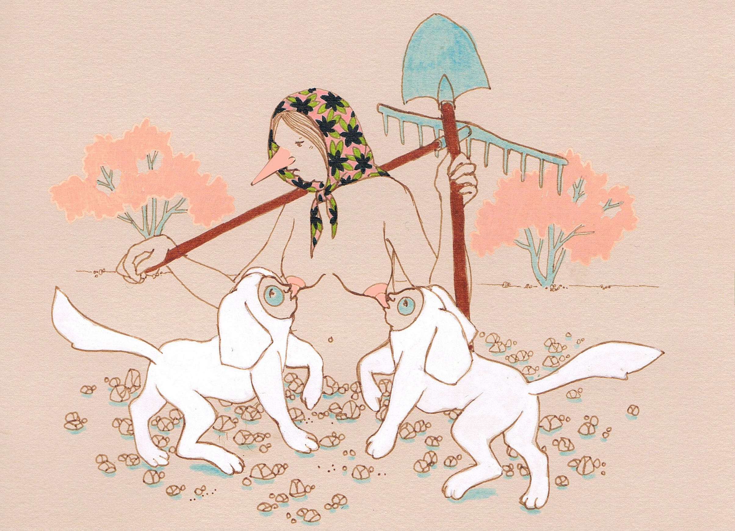 Leire Urbeltz ilustratzailearen lana